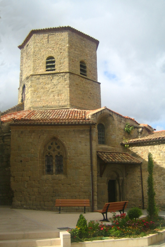 Iglesia románica de Rieux-Minervois, en el Aude, Francia.